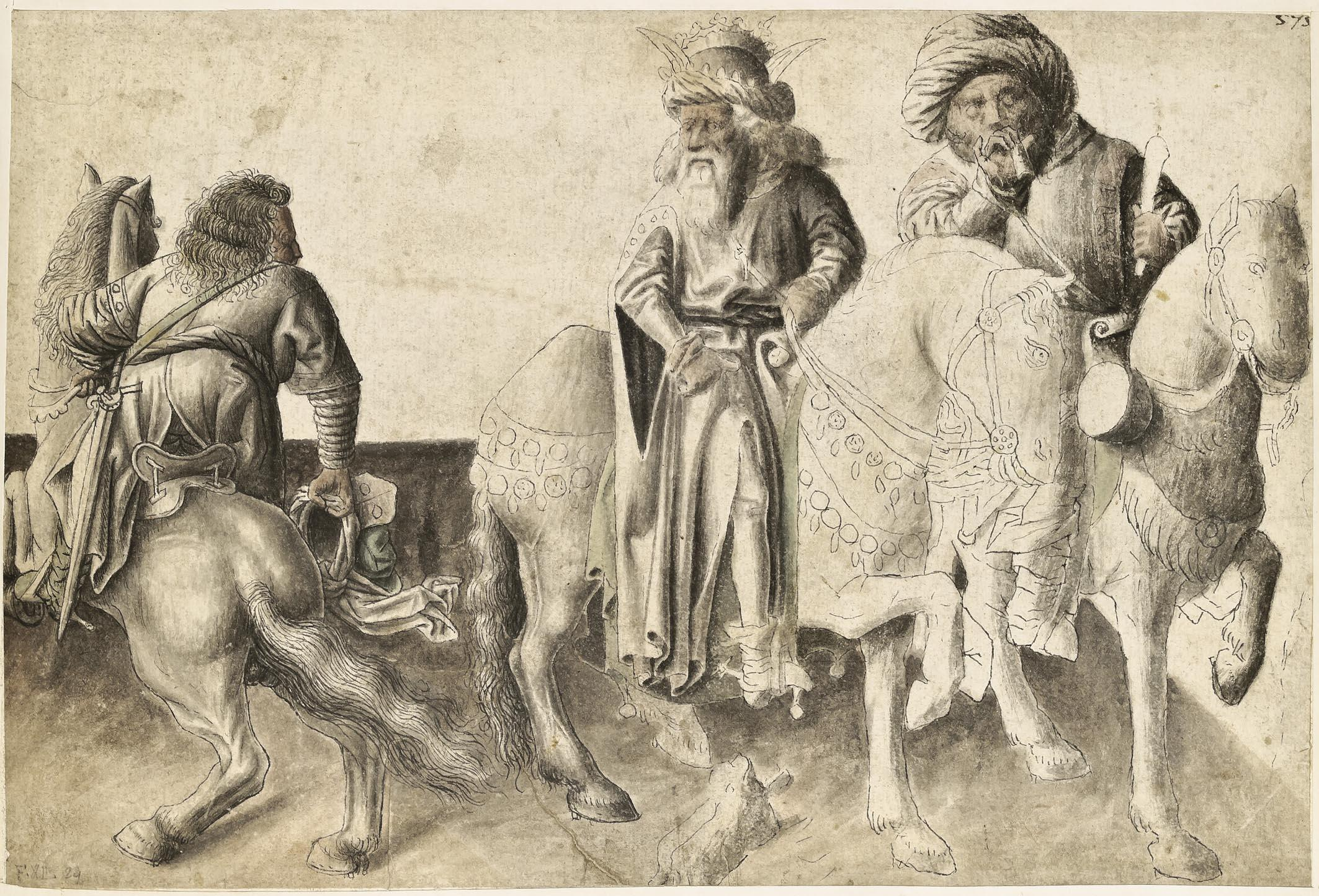 Süddeutsch (Bayern oder Nürnberg?), um 1440 Drei Reiter Feder in Grau, teilweise aquarelliert und grau laviert 17,6 x 26,3 cm aus dem "Kleinen Klebeband" des Maximilian Willibald von Waldburg-Wolfegg,bis 2011 in der Sammlung der Fürsten von Waldburg-Wolfegg auf Schloss Wolfegg (Kreis Ravensburg), seit 2011 Eigentum des Kupferstichkabinetts - Staatliche Museen zu Berlin, Preußischer Kulturbesitz, der Kunstsammlungen und Museen Augsburg, der Ernst von Siemens Kunststiftung und des Freistaates Bayern; erworben mit Unterstützung der Kulturstiftung der Länder und der Rudolf-August Oetker Stiftung für Kunst, Kultur, Wissenschaft und Denkmalpflege